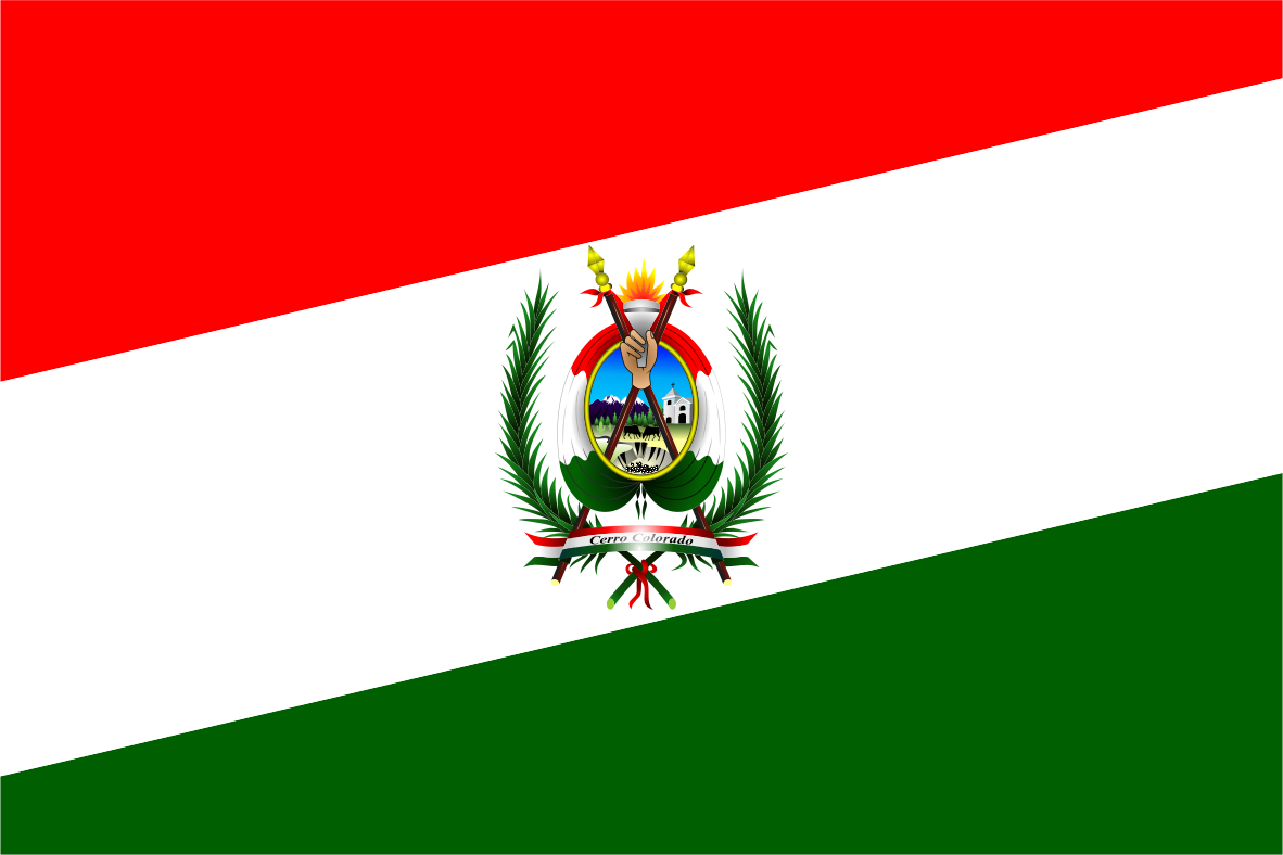 Distrito de Cerro colorado